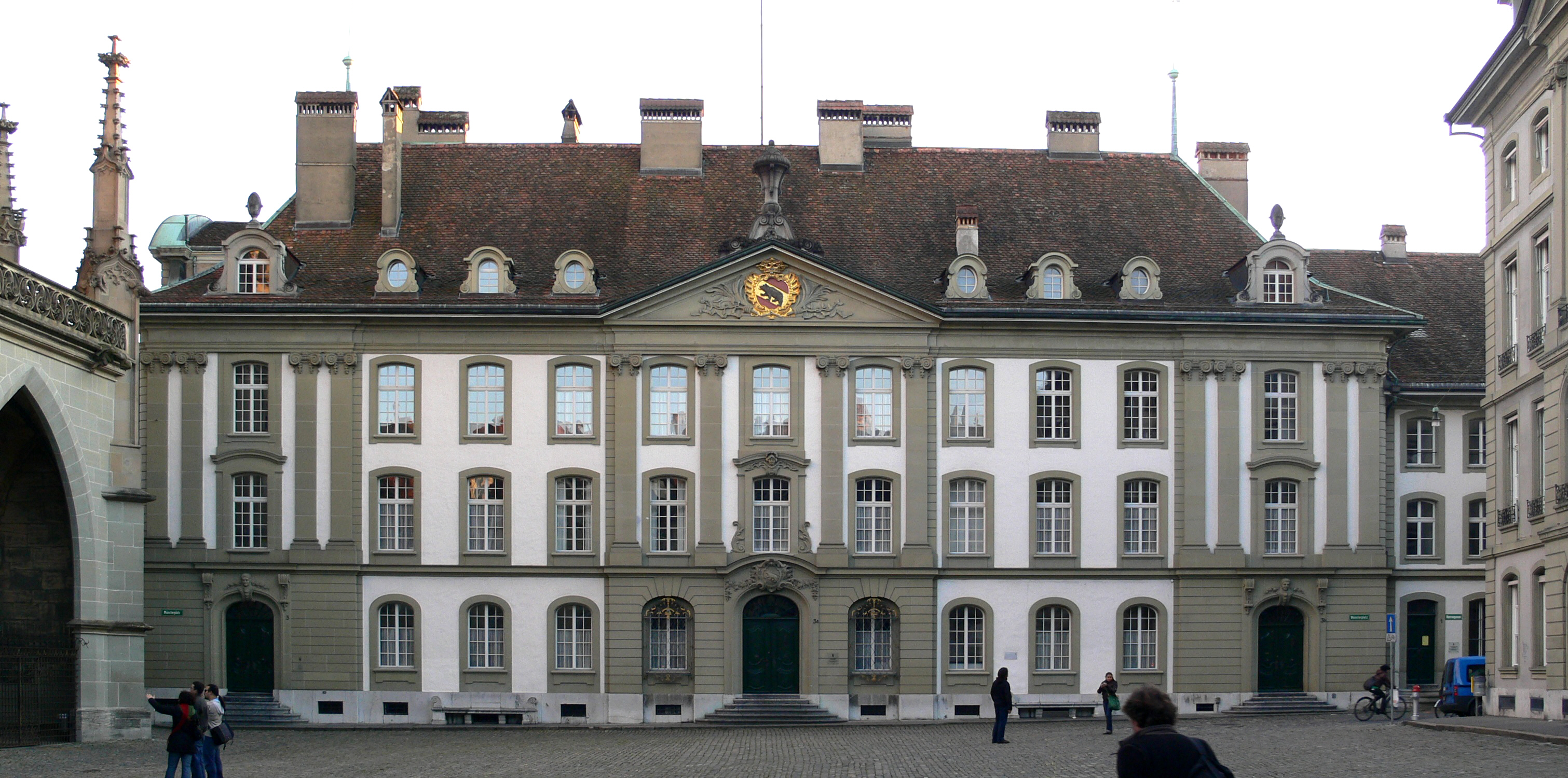 Bern, Stiftsgebäude Münsterplatz 3